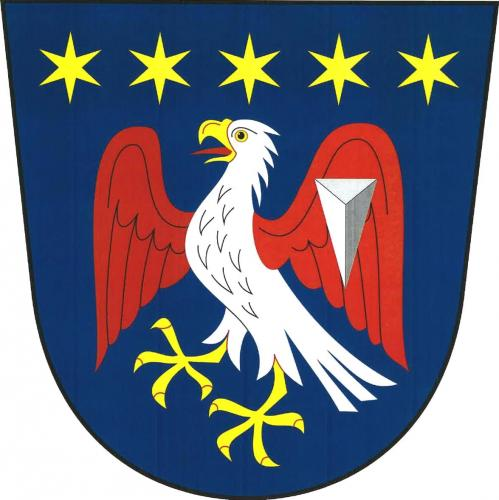 znak, Krahulčí, okres Jihlava